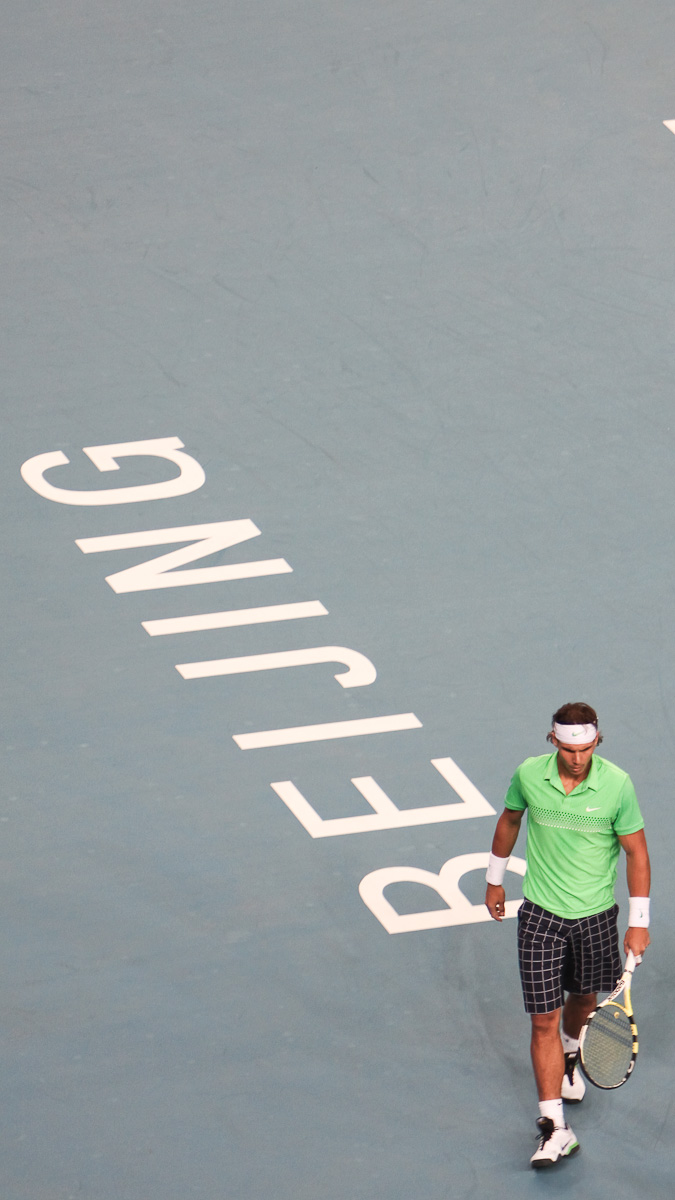 纳达尔。